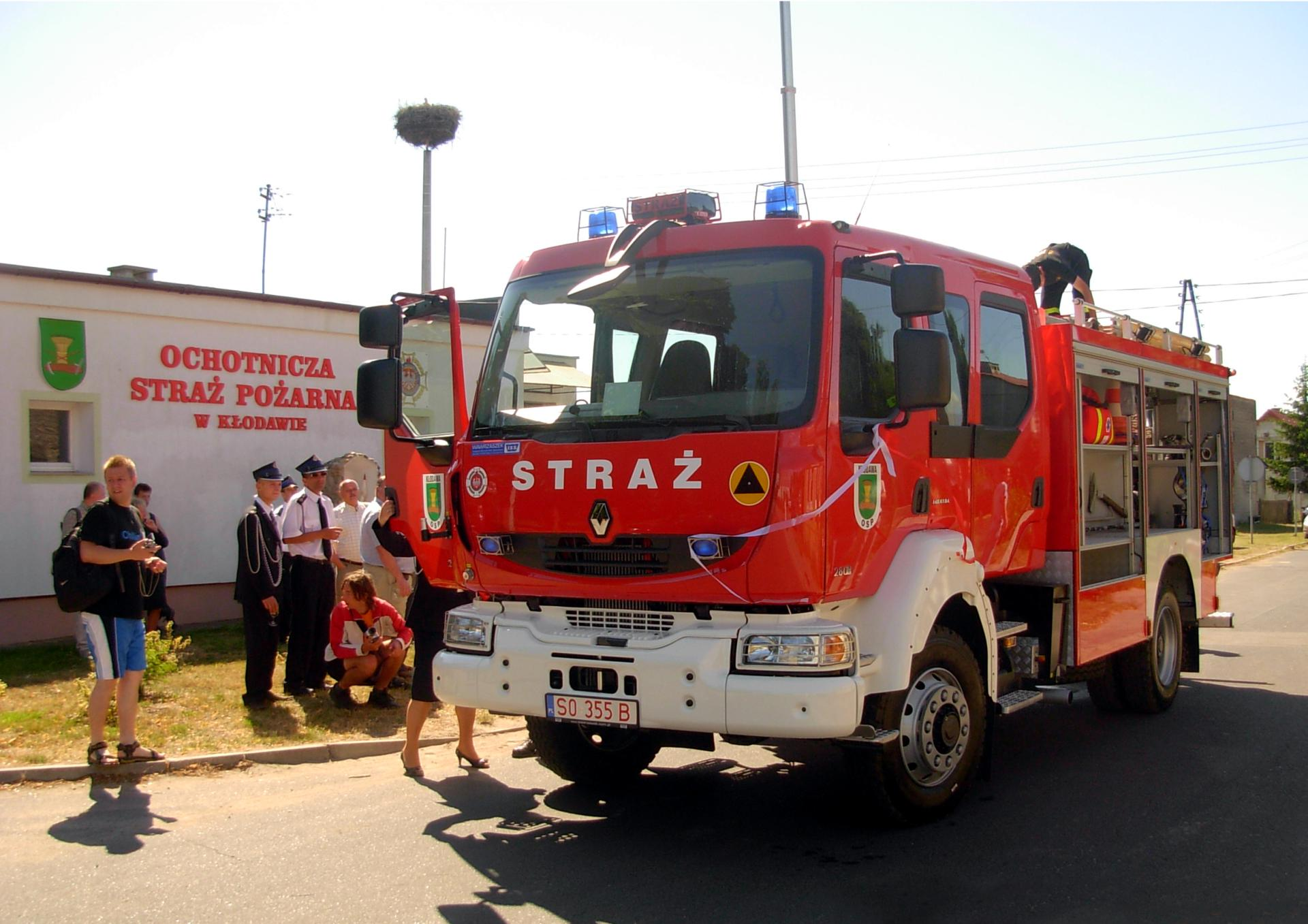 OSP Kłodawa